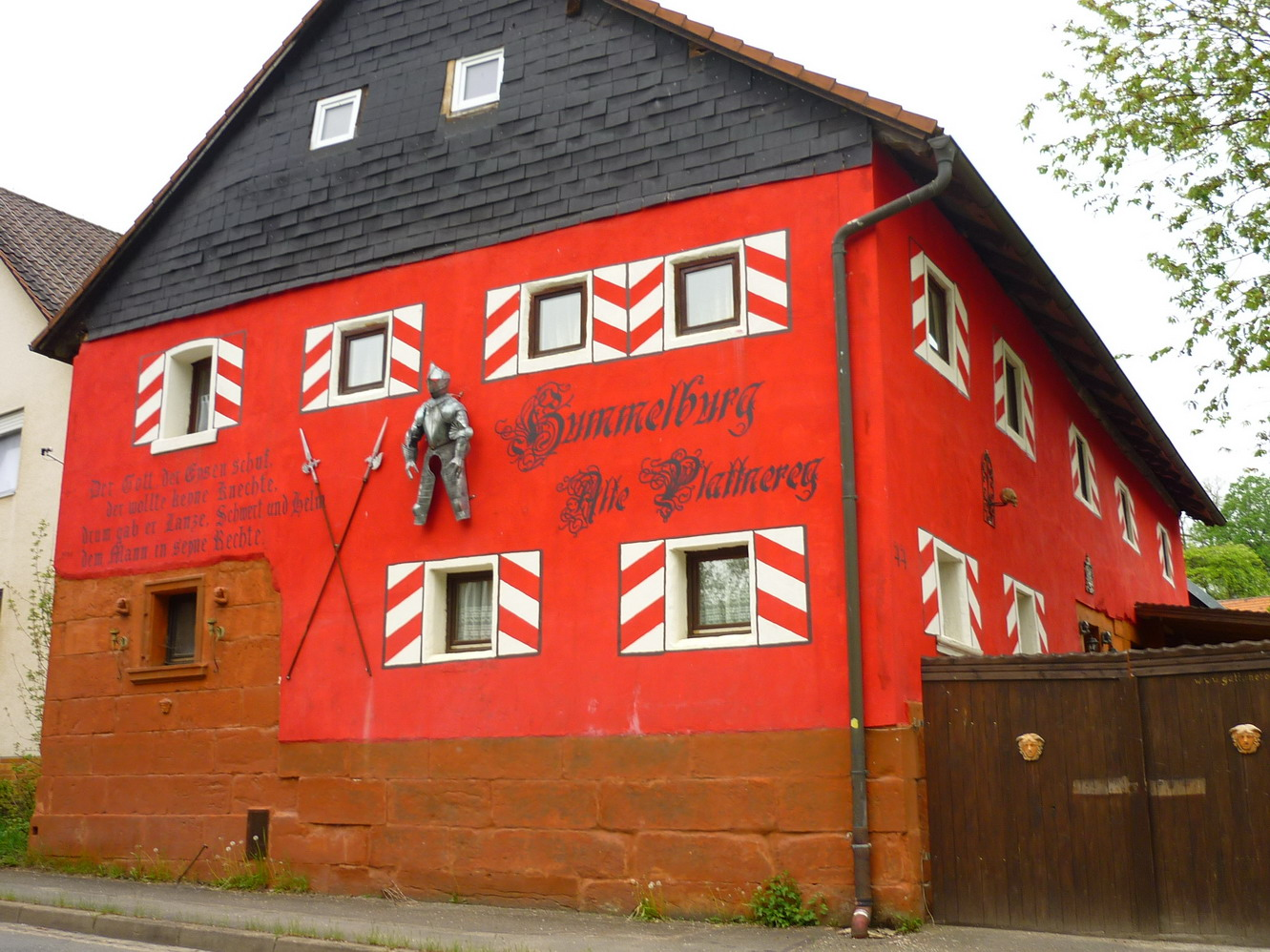 Alte Plattnerei Hummelburg im Ortsteil Creez, Gemeinde Hummeltal